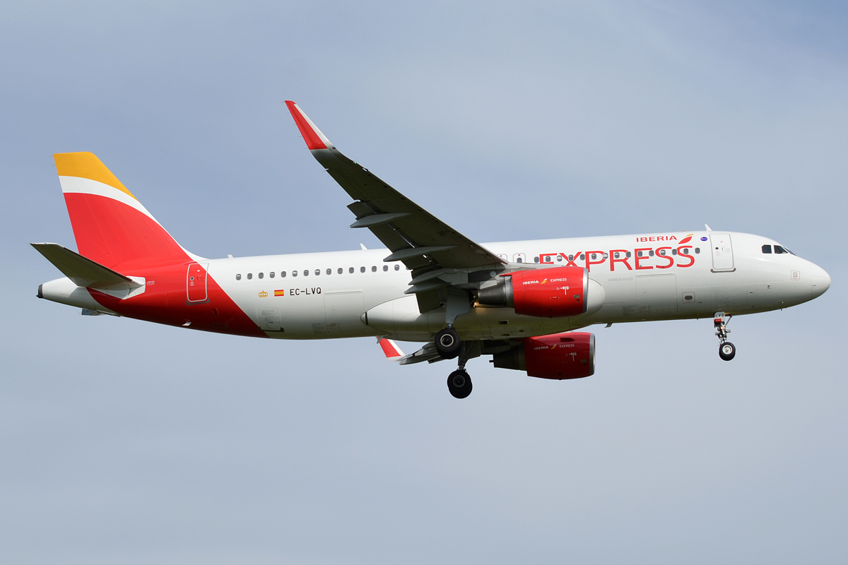 Iberia Express, EC-LVQ, Airbus A320-216